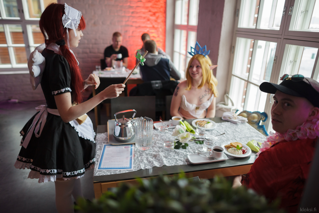 Desucon Frostbite 2014. Sibeliustalo, Lahti